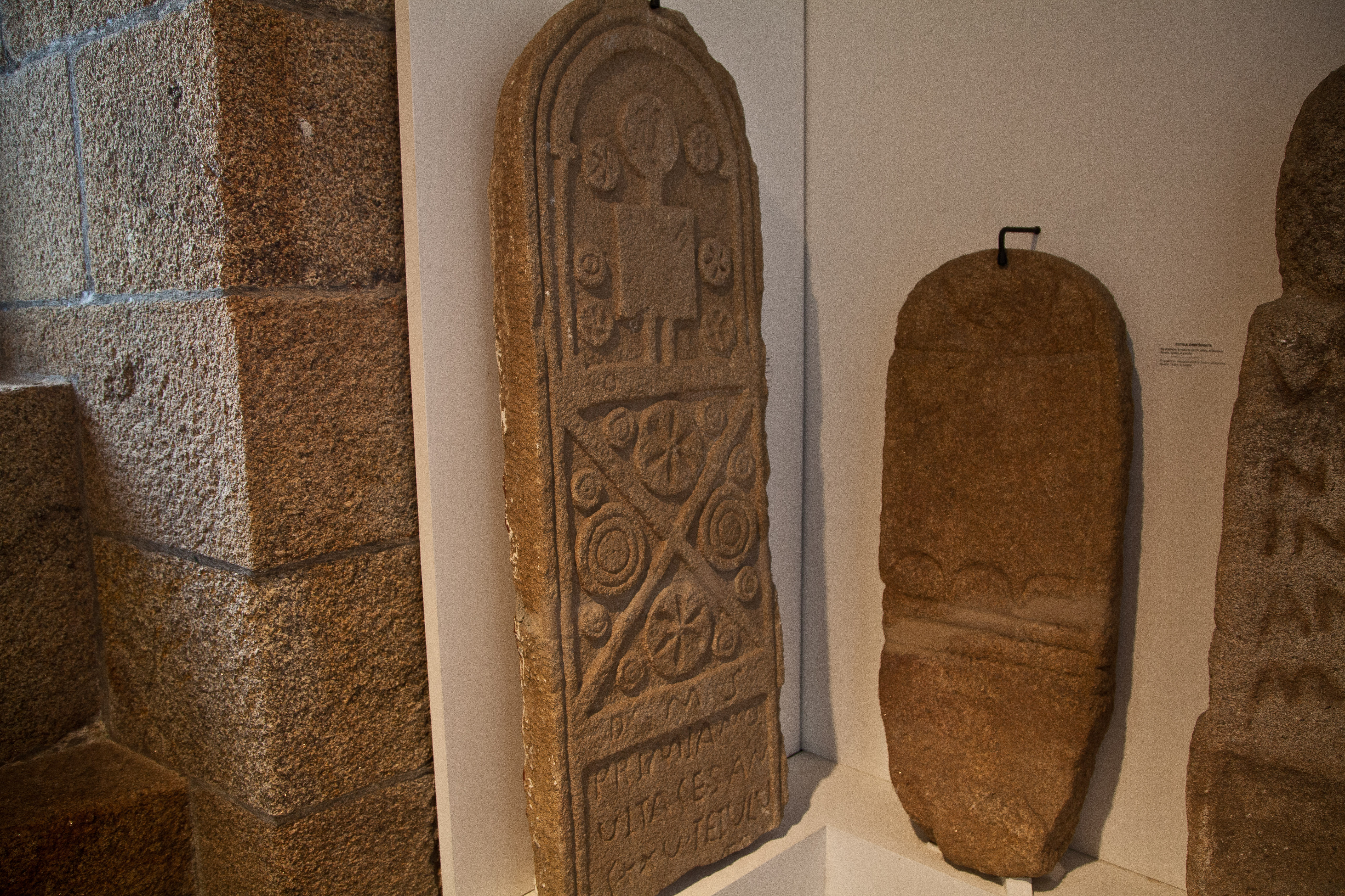 Estela de Primiano D(is) M(anibus) S(acrum)/ PRIMIANO/ VITALES AN/ LXXV/ TETVLV/ [---] Consagrado aos Deuses Manes. A Primiano, fillo de Vital, de 75 anos. Inscrición ... Procedencia: Rodeiro, Mazarelas, Oza dos Ríos, A Coruña.